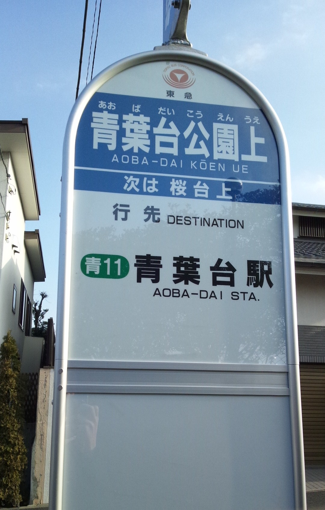 東急バス停留所青11系統 「青葉台公園上」